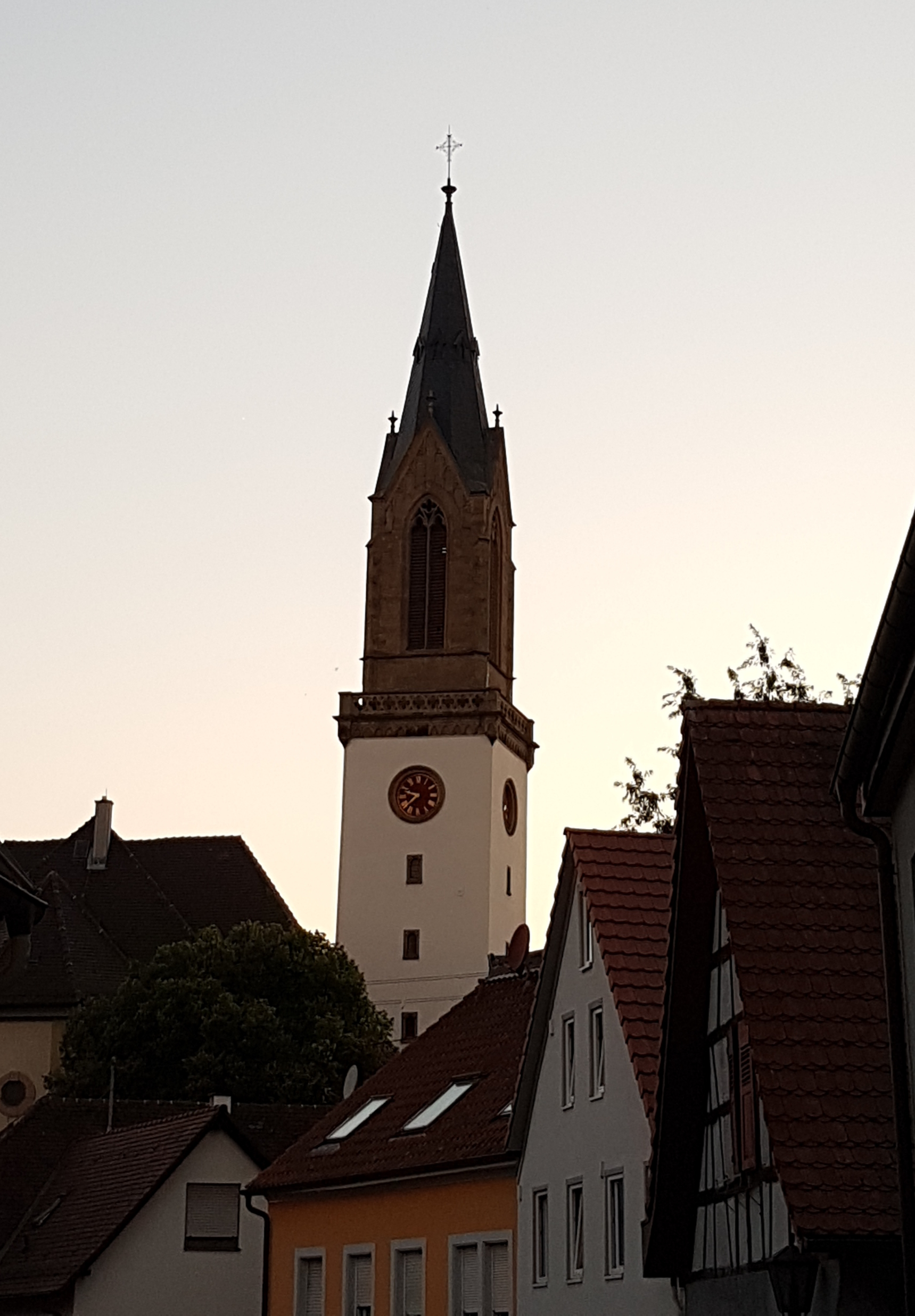 Turm der Stiftskirche Bretten